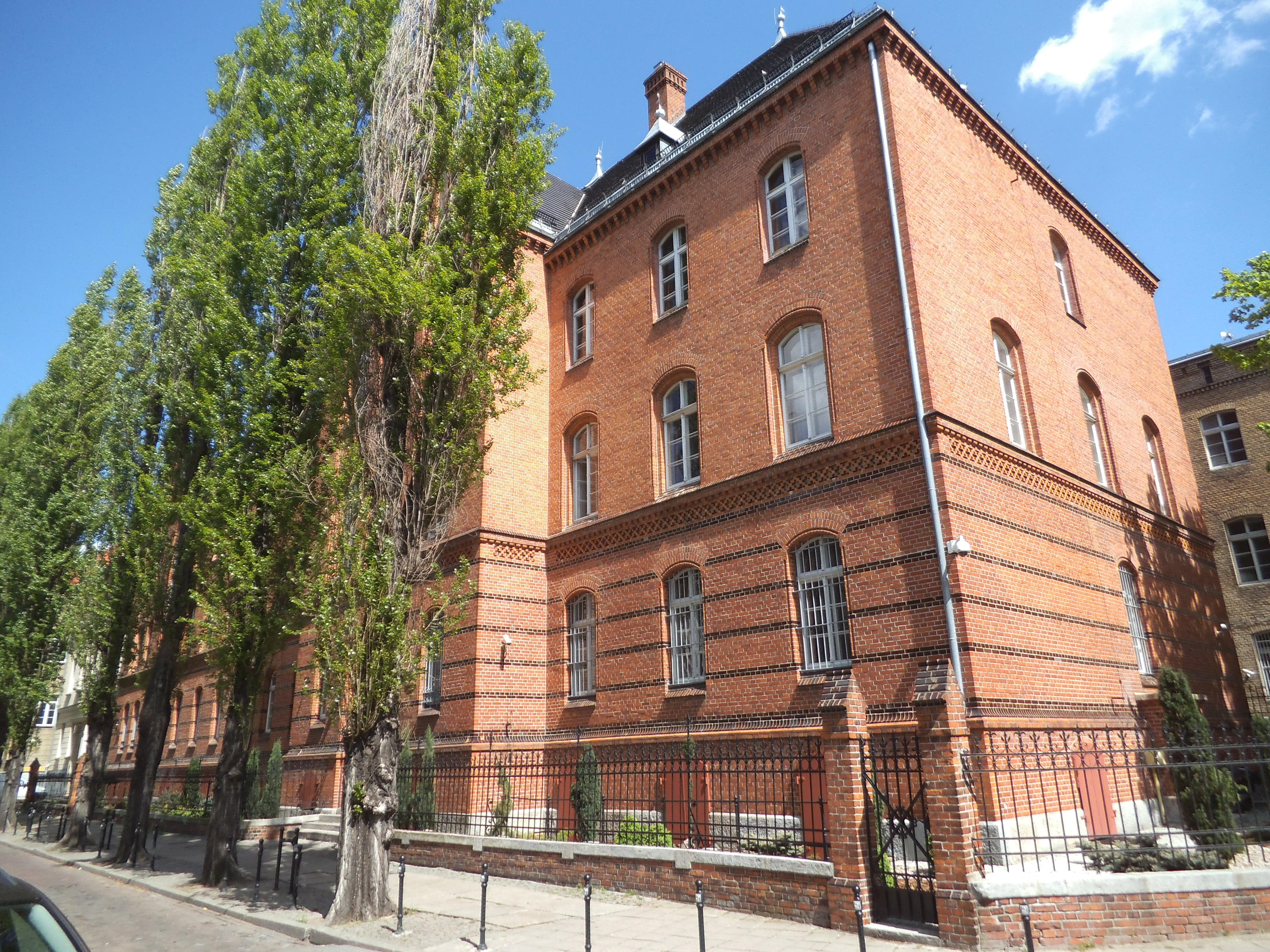 Sąd Rejonowy w Toruniu